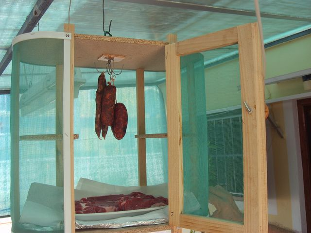 Carnera tradicional per protegir carn i embotit de les mosques (Sueca, Mareny B., Spain) Garde manger traditionnel pour protéger viande et embouti des mouches Carnera tradicional par proteger carne y embutido de las moscas.